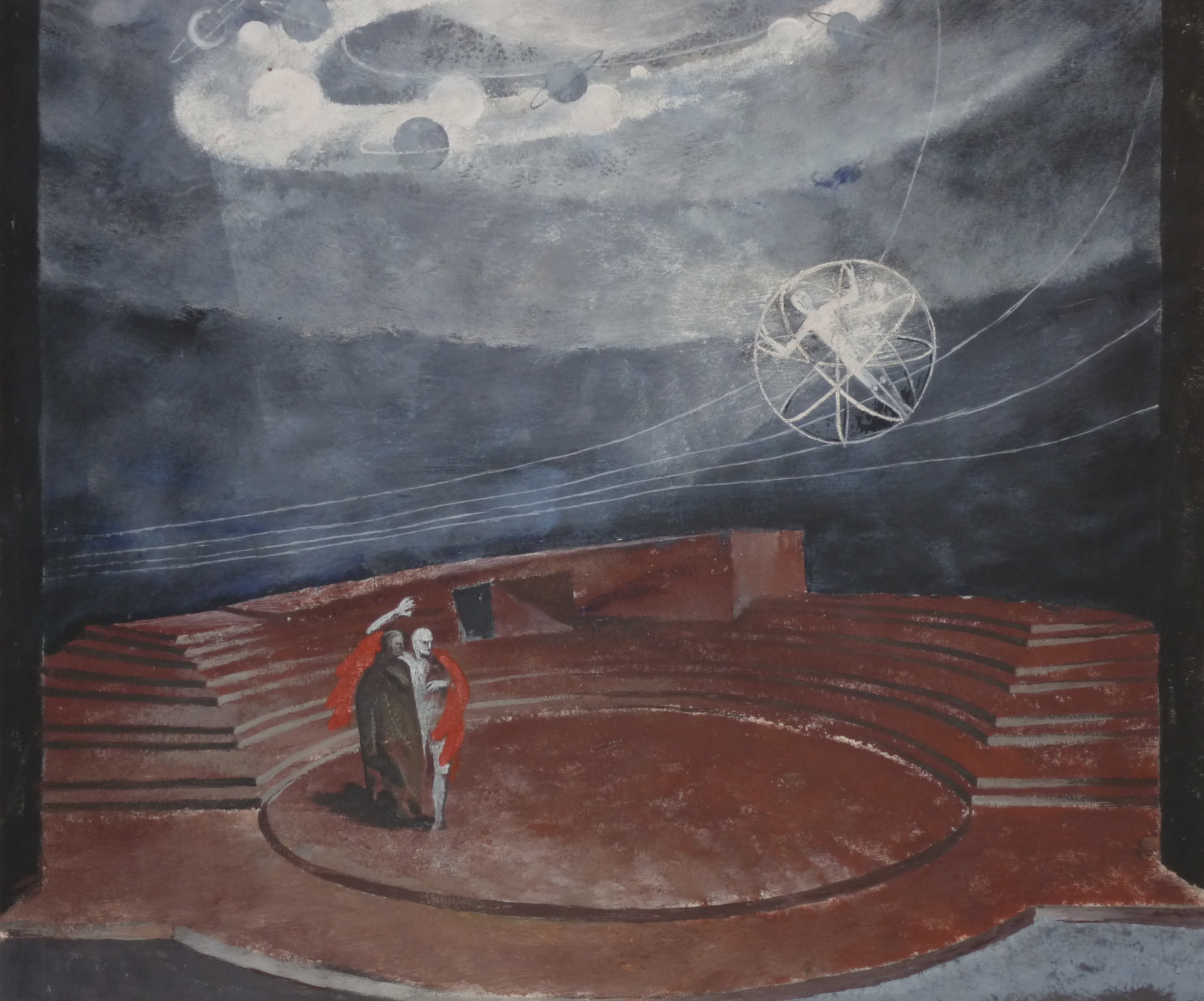 Bühnenbildentwurf von Helmut Jürgens für "Faust II" von J. W. Goethe, Aufführung München 1949